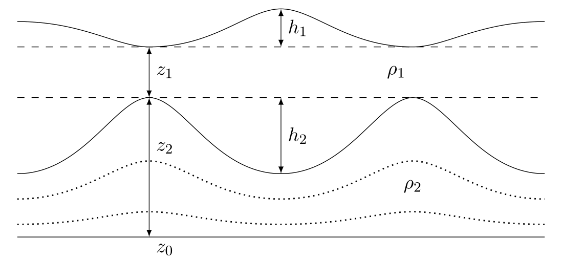 Эту картинку я создал сам во время работы над курсовой работой, рисовал сам